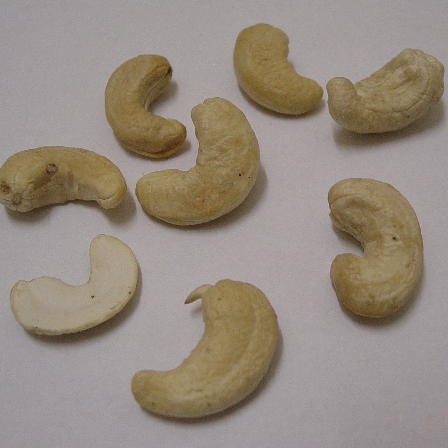 കശുവണ്ടി പരിപ്പ്